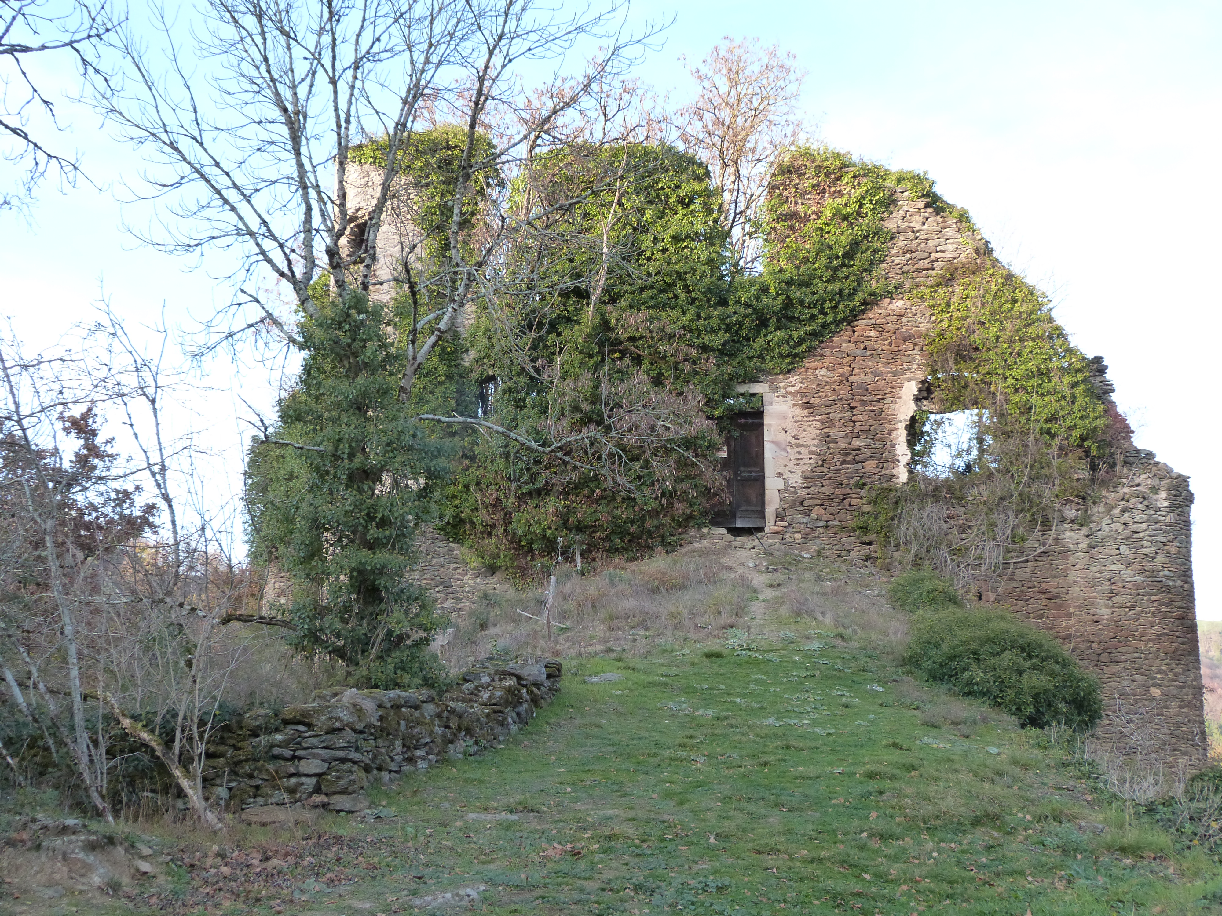 vestiges du château de Castelmary (Aveyron)